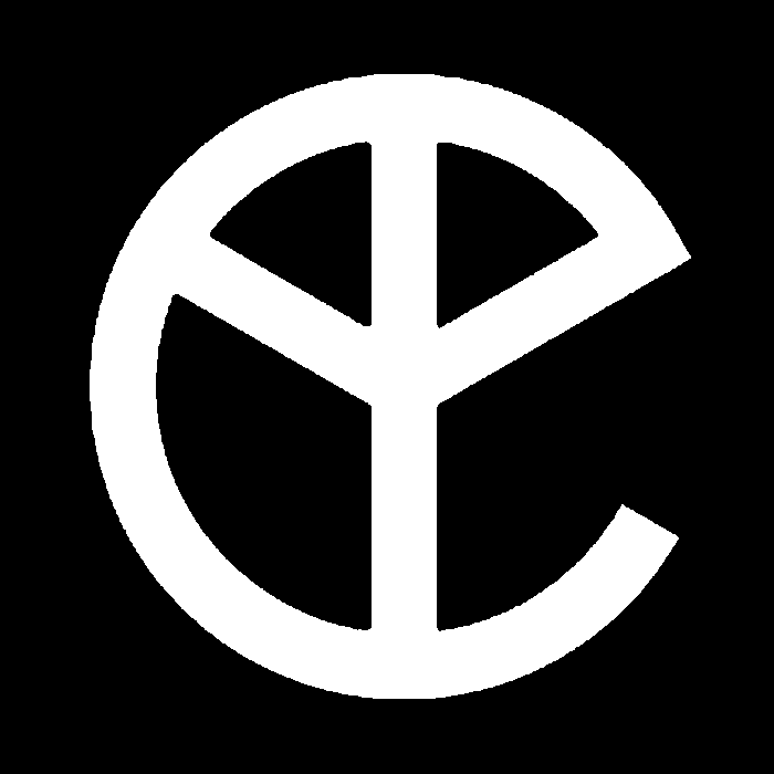 Эмблема музыкального коллектива "Yellow Claw".